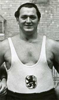 Heinz Schattner Privatfoto